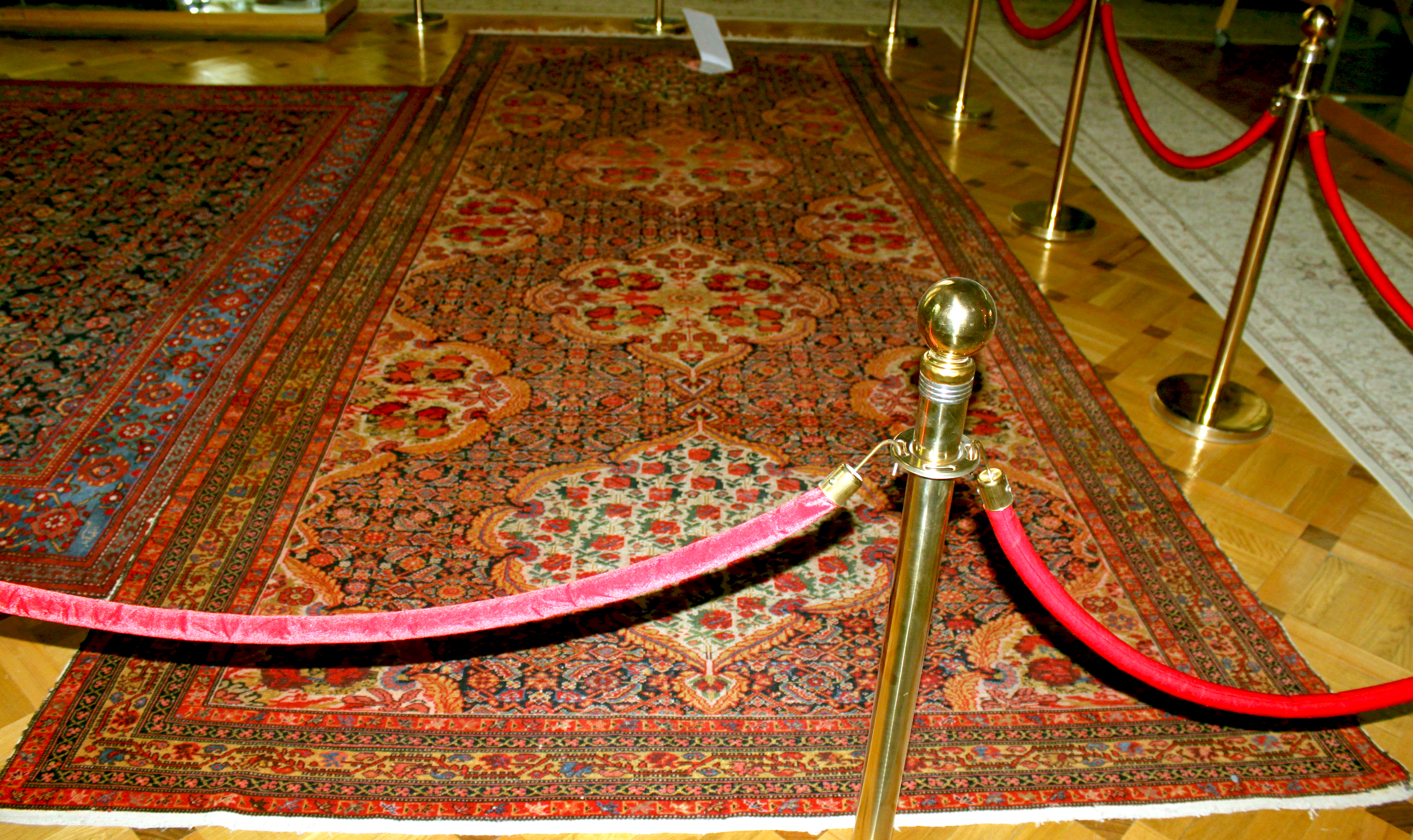 Qarabağ xan ailəsinə məsxus "Xonçalı" adlı Təbriz xalçası